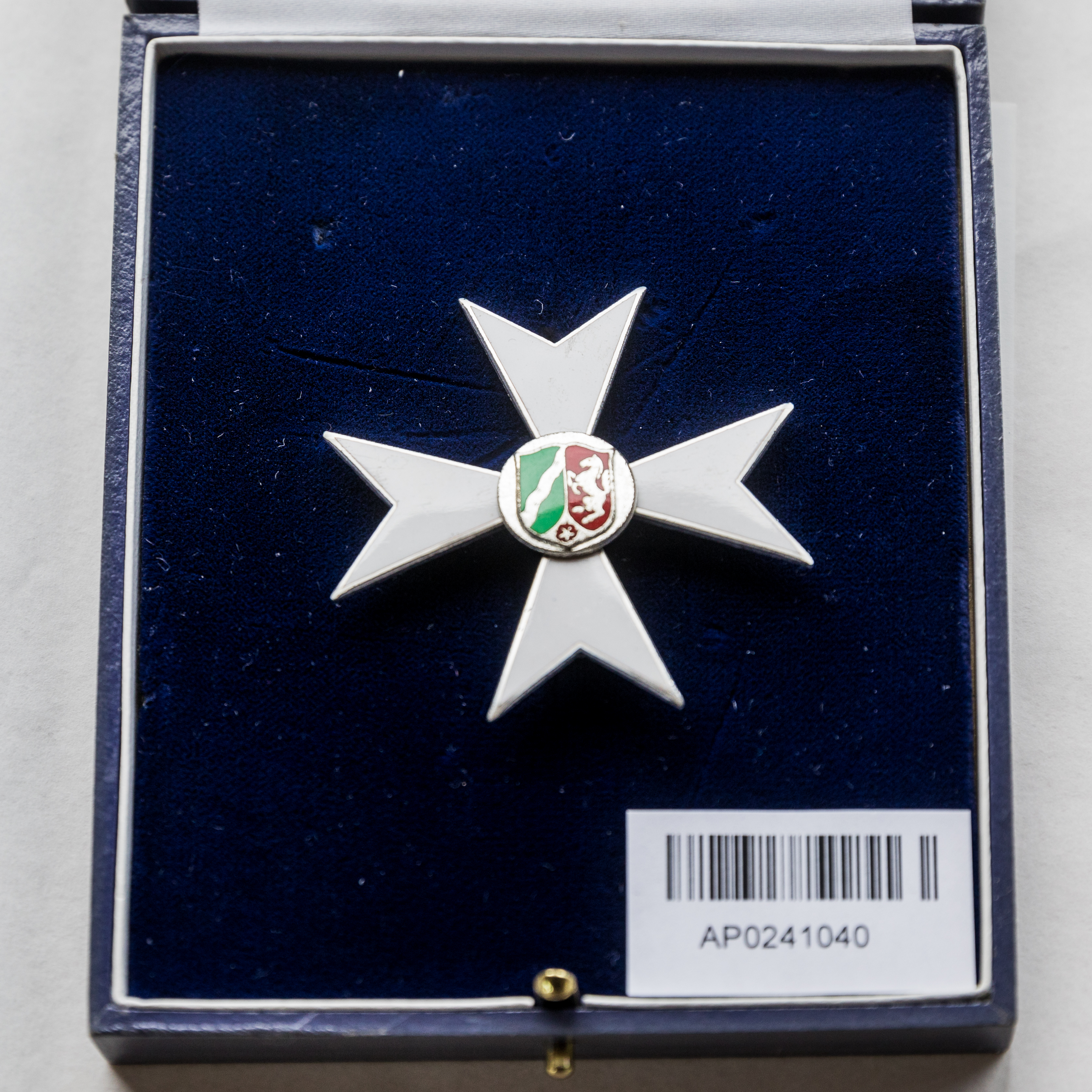 Der persönliche Nachlass des Kölner Verlegers Alfred Neven DuMont wurde fünf Jahre nach seinem Tod von der Familie an das Historische Archiv der Stadt Köln übergeben Foto: Verdienstorden des Landes Nordrhein-Westfalen